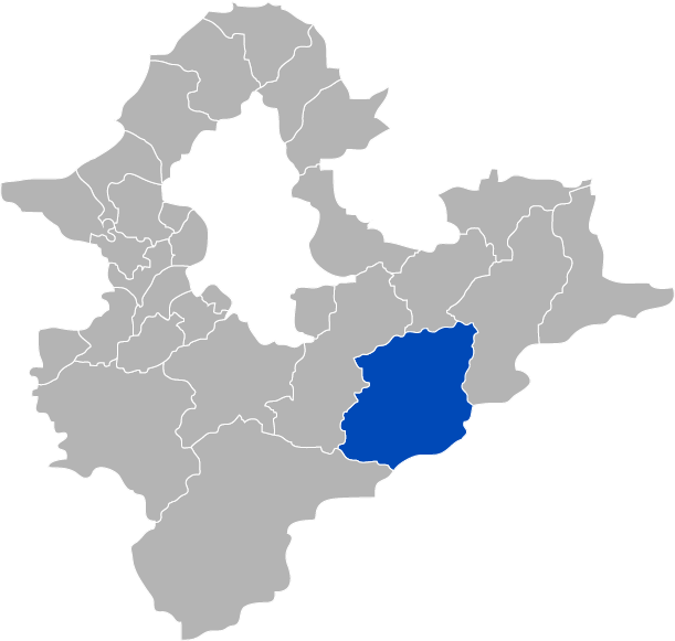 KaurJmeb為編寫臺灣省臺北縣坪林鄉，於2005年2月6日所繪。